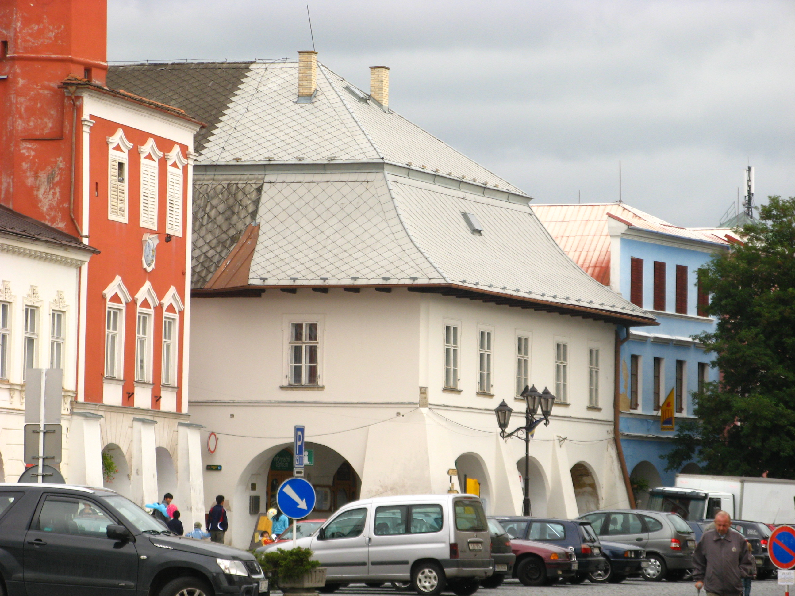 Dům U mouřenína na Náměstí míru ve Svitavách